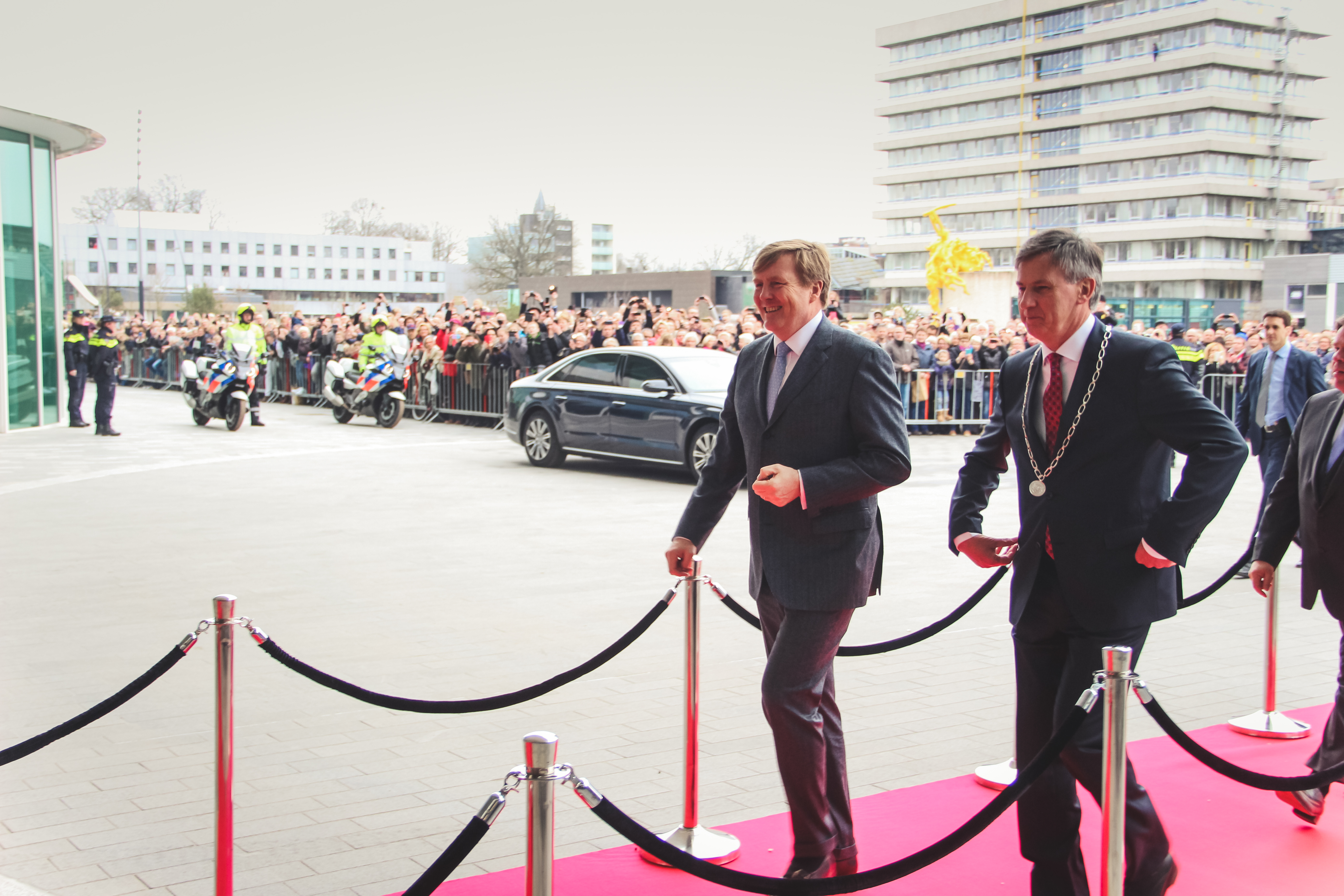 Officiële opening van Wildlands Adventure Zoo Emmen door Zijne Majesteit de Koning Willem-Alexander